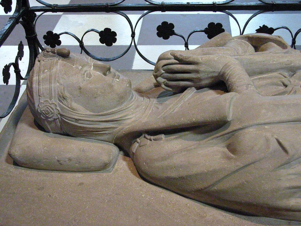 Braunschweiger Dom: Detail des Grabmals Mathildes